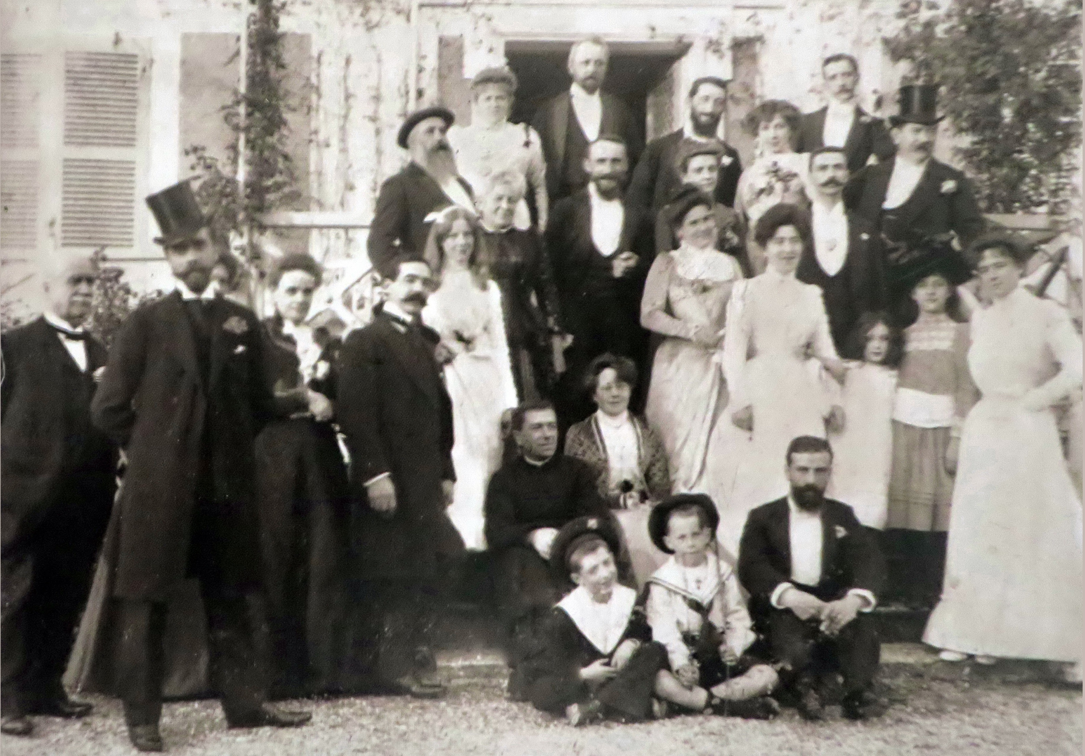 Photographie anonyme, Giverny,31 octobre 1900. La famille Monet-Hoschedé fête le mariage de Marthe Hoschedé et de Théodore Butler. Pierre Sisley est assis par terre à droite ; sa soeur Jeanne est debout derrière lui ; Monet est sur les marches à gauche. Collection Jean-Marie Toulgouat, Giverny (reproduit dans Claire et Joyes et ai., Monet at Giverny, Londres, 1975, et dans Richard Shone, Sisley, Londres, 1992, fig.160.